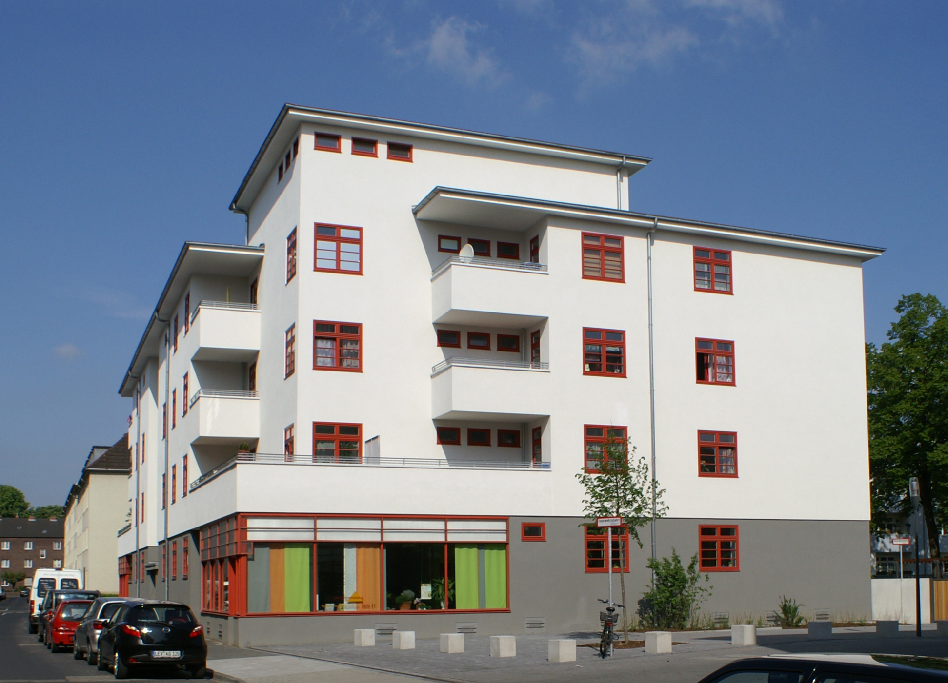 Köln-Buchforst, sanierte Wohnsiedlung Blauer Hof